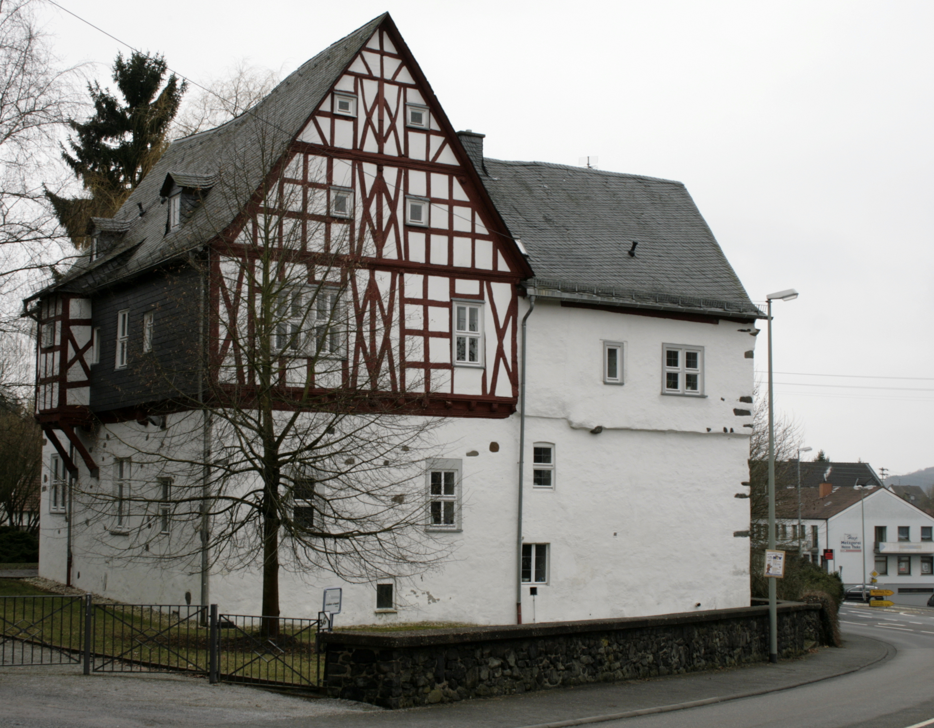 Hofhaus in Langendernbach, Deutschland, aus Nordwesten gesehen